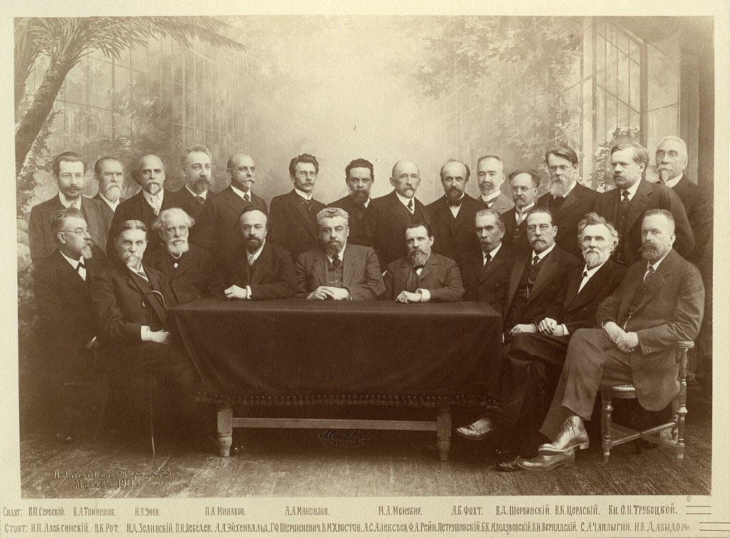 Фотография группы профессоров, уволившихся в 1911 году из Московского университета, в знак протеста против незаконного увольнения ряда профессоров и нарушения университетской автономии. На фотографии. Сидят: В. П. Сербский, К. А. Тимирязев, Н. А. Умов, П. А. Минаков, М. А. Мензбир, А. Б. Фохт, В. Д. Шервинский, В. К. Цераский, Е. Н. Трубецкой Стоят: И. П. Алексинский, В. К. Рот, Н. Д. Зелинский, П. Н. Лебедев, А. А. Эйхенвальд, Г. Ф. Шершеневич, В. М. Хвостов, А. С. Алексеев, Ф. А. Рейн, Д. М. Петрушевский, Б. К. Млодзеевский, В. И. Вернадский, С. А. Чаплыгин, Н. В. Давыдов